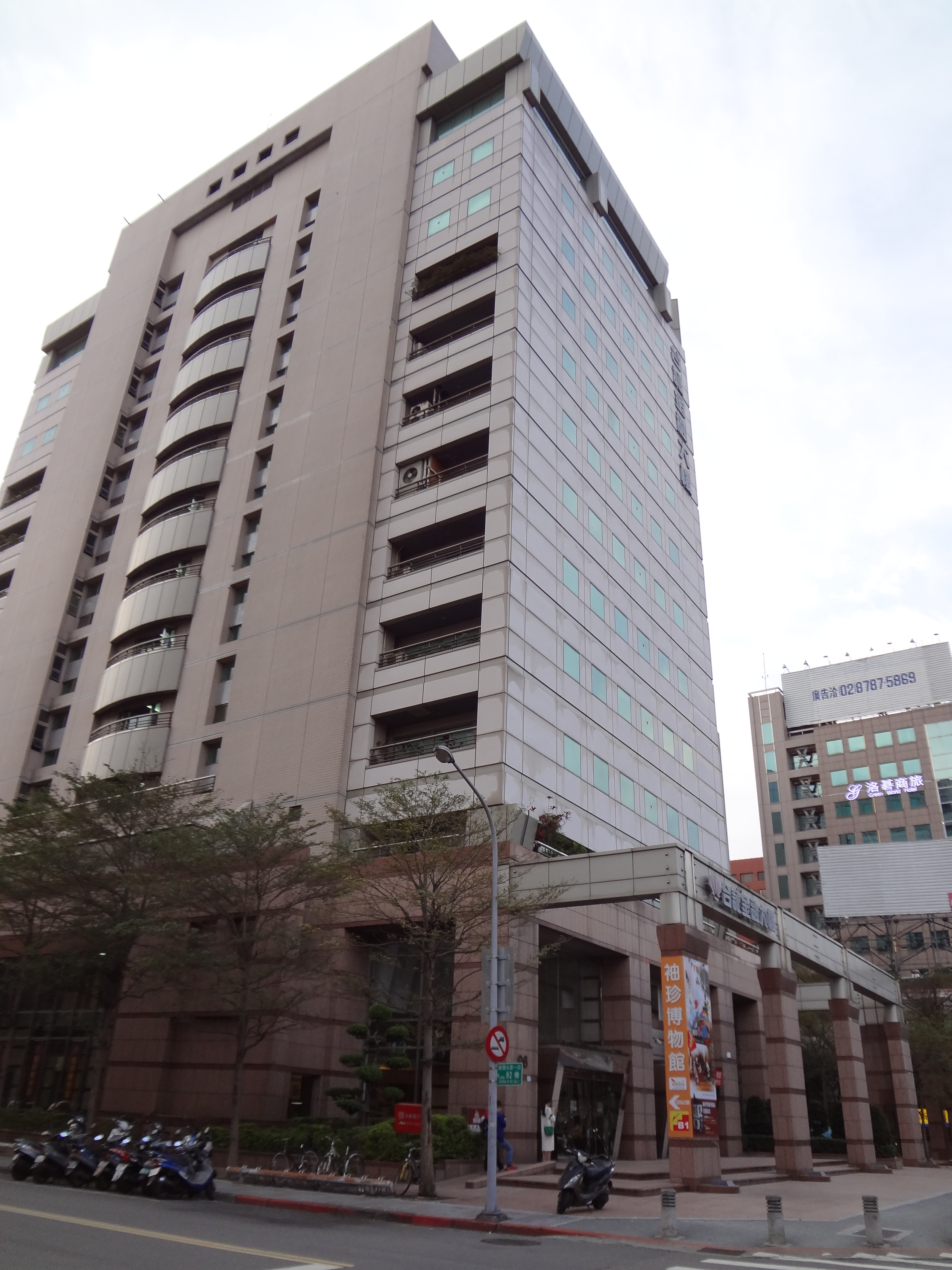 台証金融大樓，位於臺北市中山區建國北路一段96號。袖珍博物館位於地下1樓。